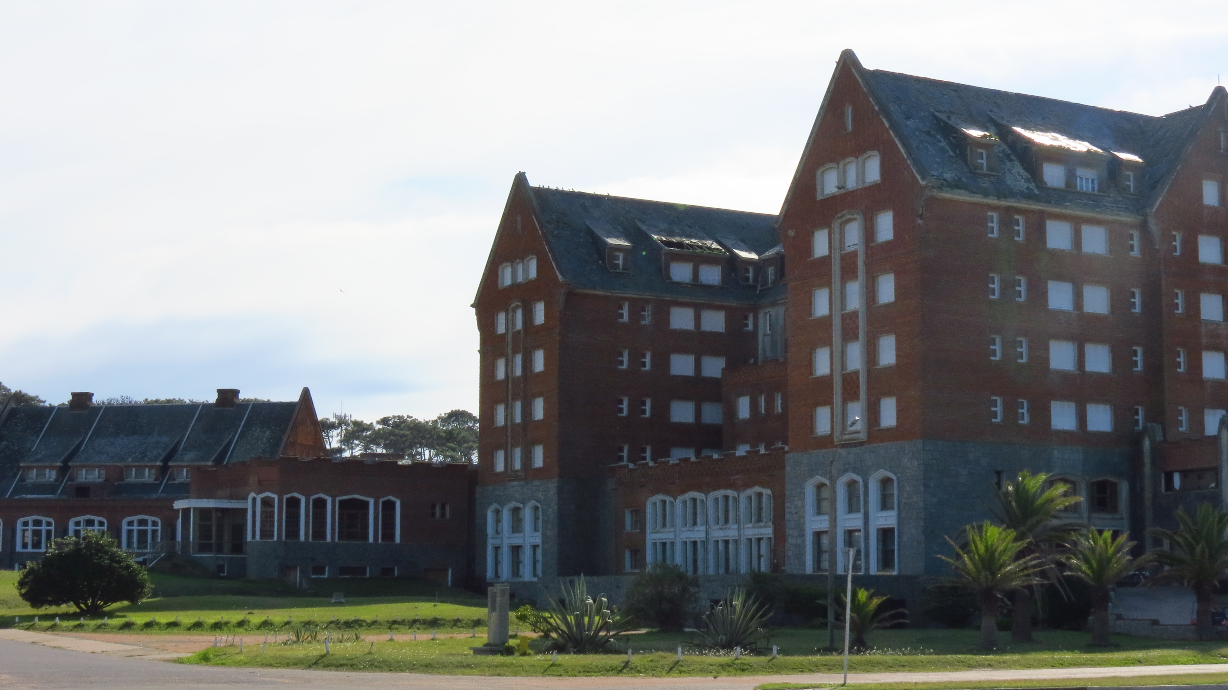 Unos de los hoteles más importante que tuvo Punta del Este y la Region.